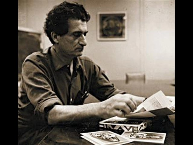 Бедри Рахми Еюбоглу за работой